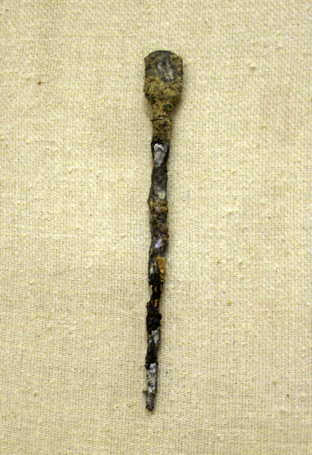 Писало, Крапивенского городища. Древнерусская культура, X–XIII века. Из фондов Шебекинского историко-художественном музея.